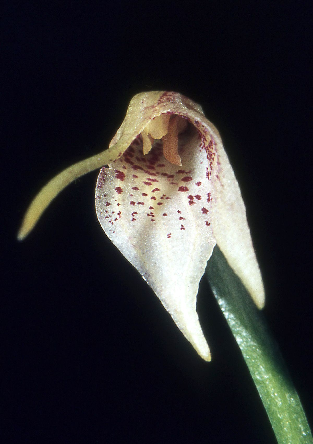 Masdevallia guttulata